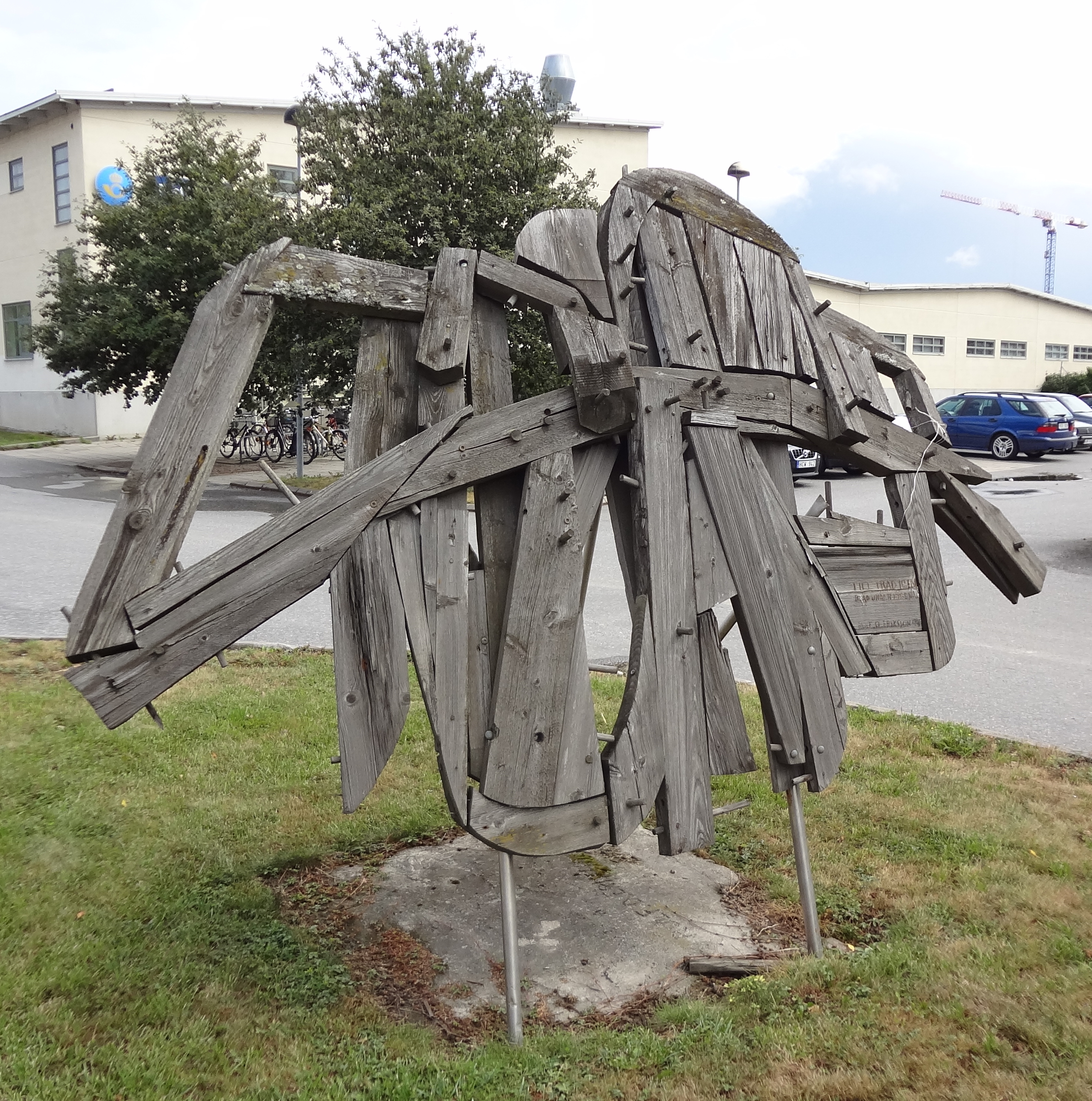 Till träd igen av Rolf O Eriksson 1994, Björksgatan 5, Eskilstuna.